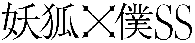 Inu x Boku SS Logo